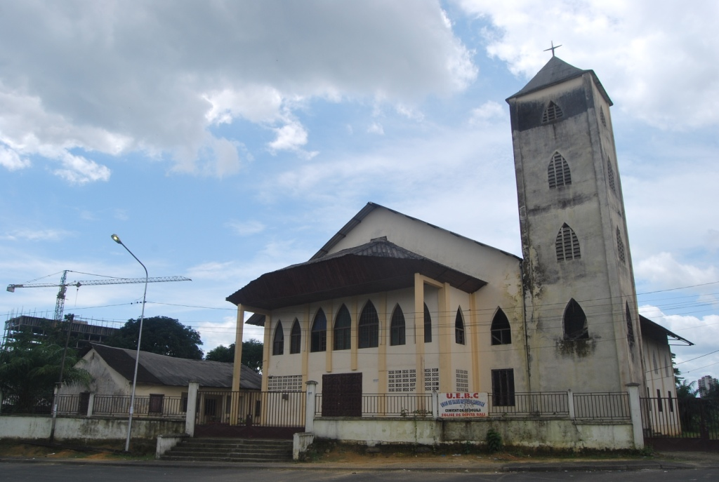 Église baptiste de Dipita Bali, Douala. Union des églises baptistes du Cameroun.